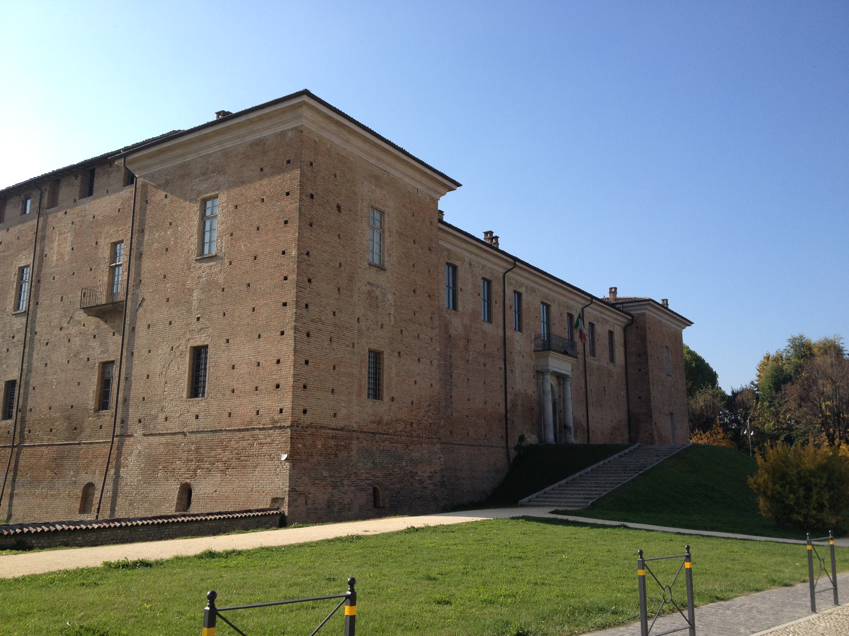 Veduta del Castello Visconteo di Voghera (PV)